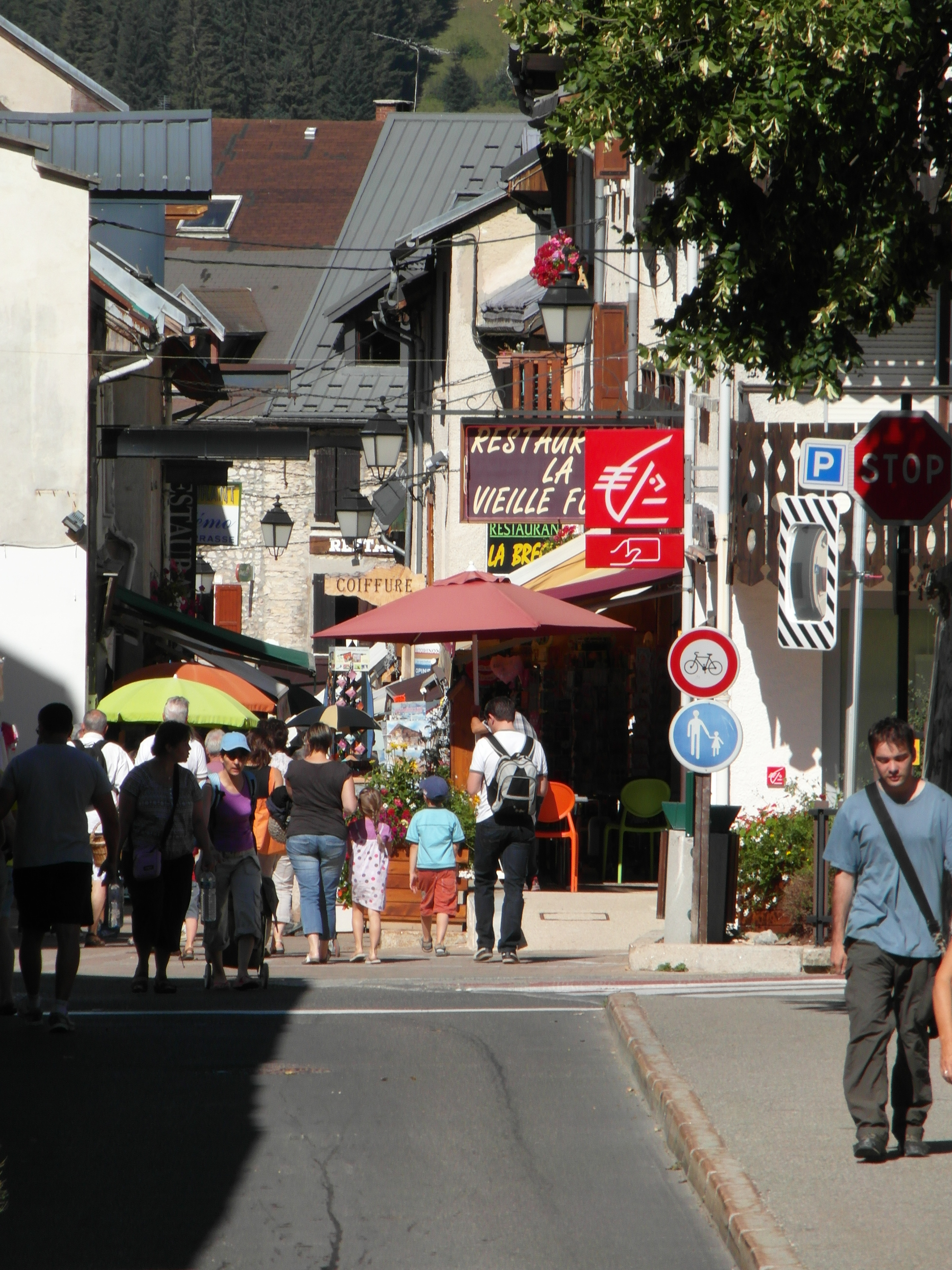 Rue piétonne de Villard en aout 2012